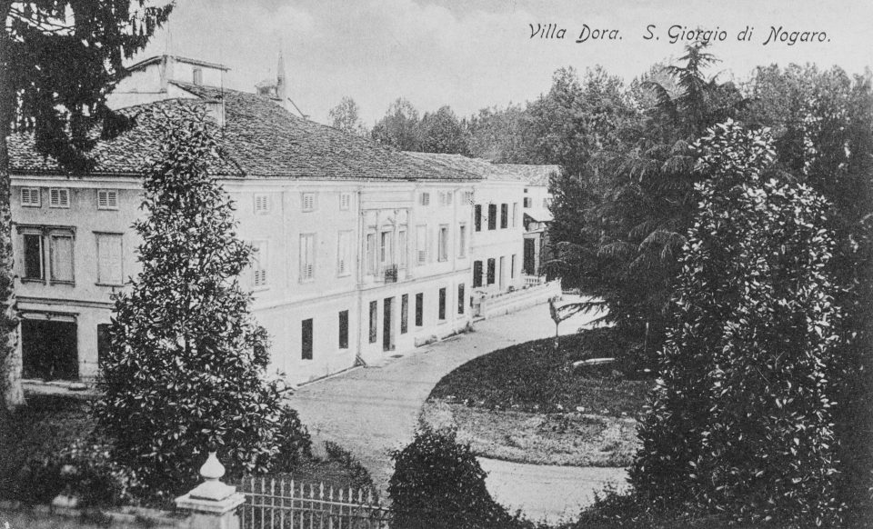 Villa Dora - Residenza della Famiglia Novelli